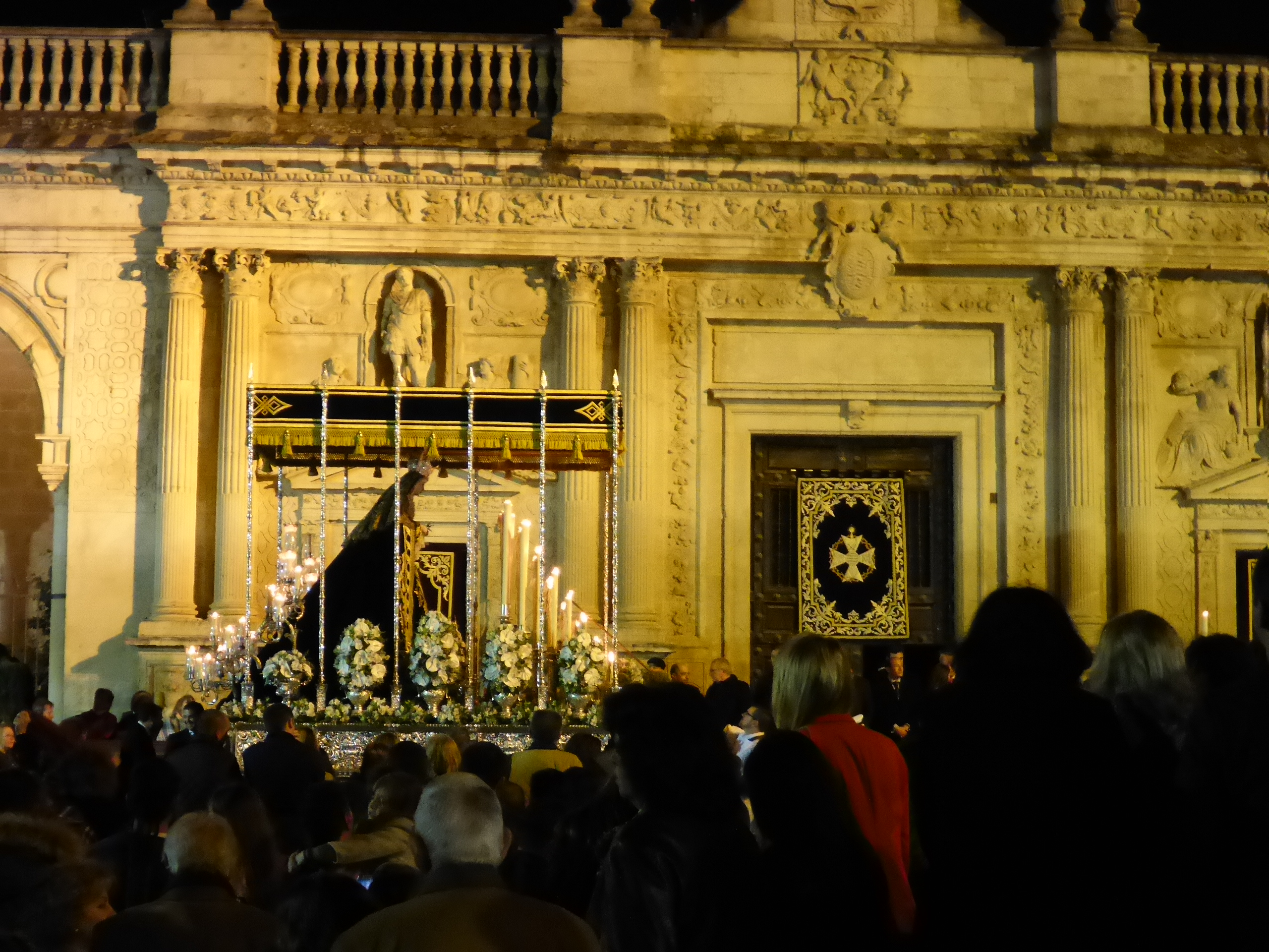 Hermandad del Consuelo (Jerez, España) This is a photography of a Folklore festival in Spain (Wikidata id Q6124533).